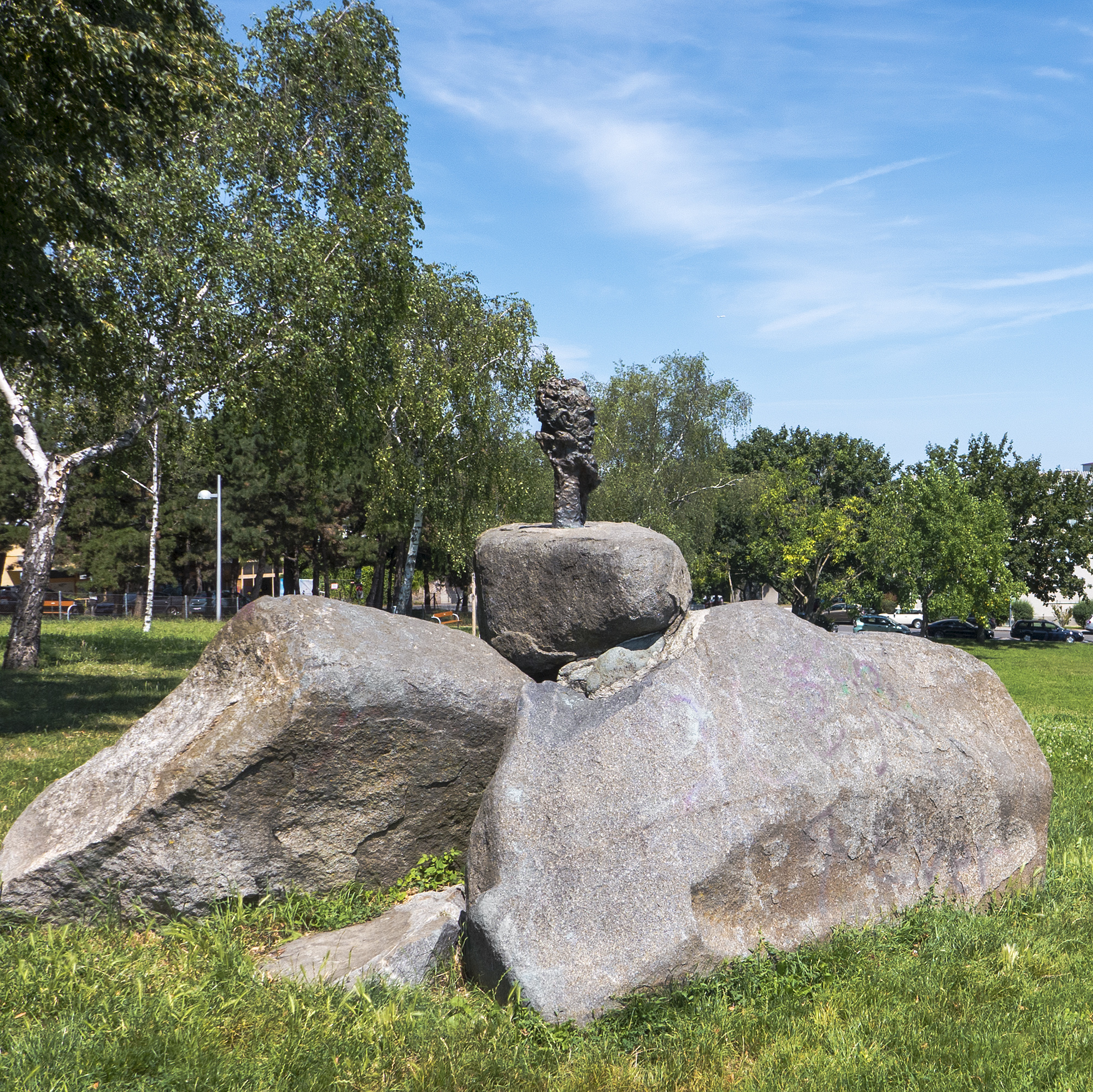 Fridtjof-Nansen-Park in Wien 23